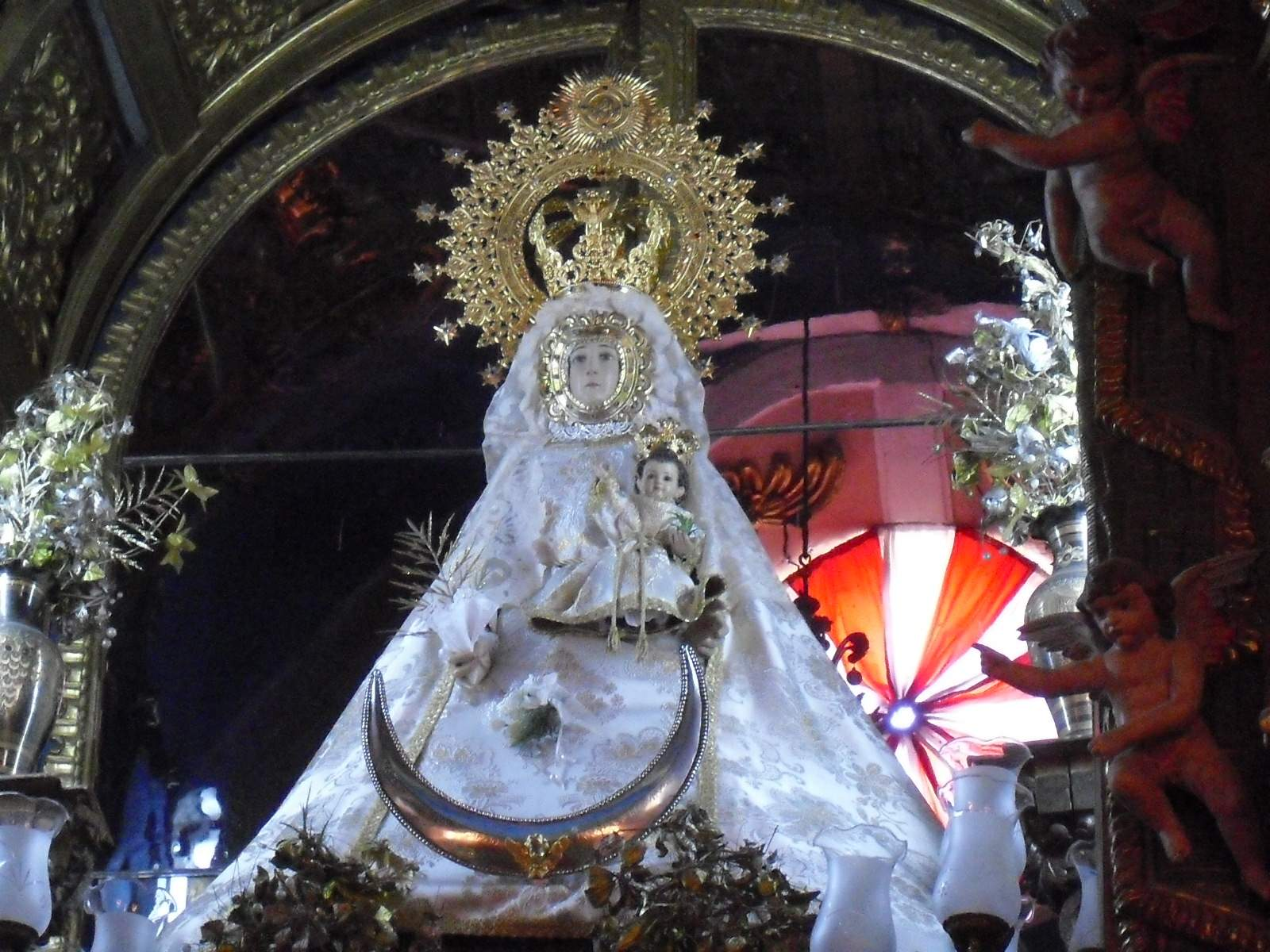 Santuario del Cubillo. Octubre de 2011